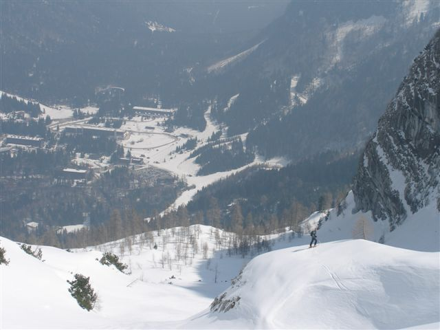 Sella Nevea dal Canin. Foto scattata durante un'escursione fuoripista Pasqua 2006.